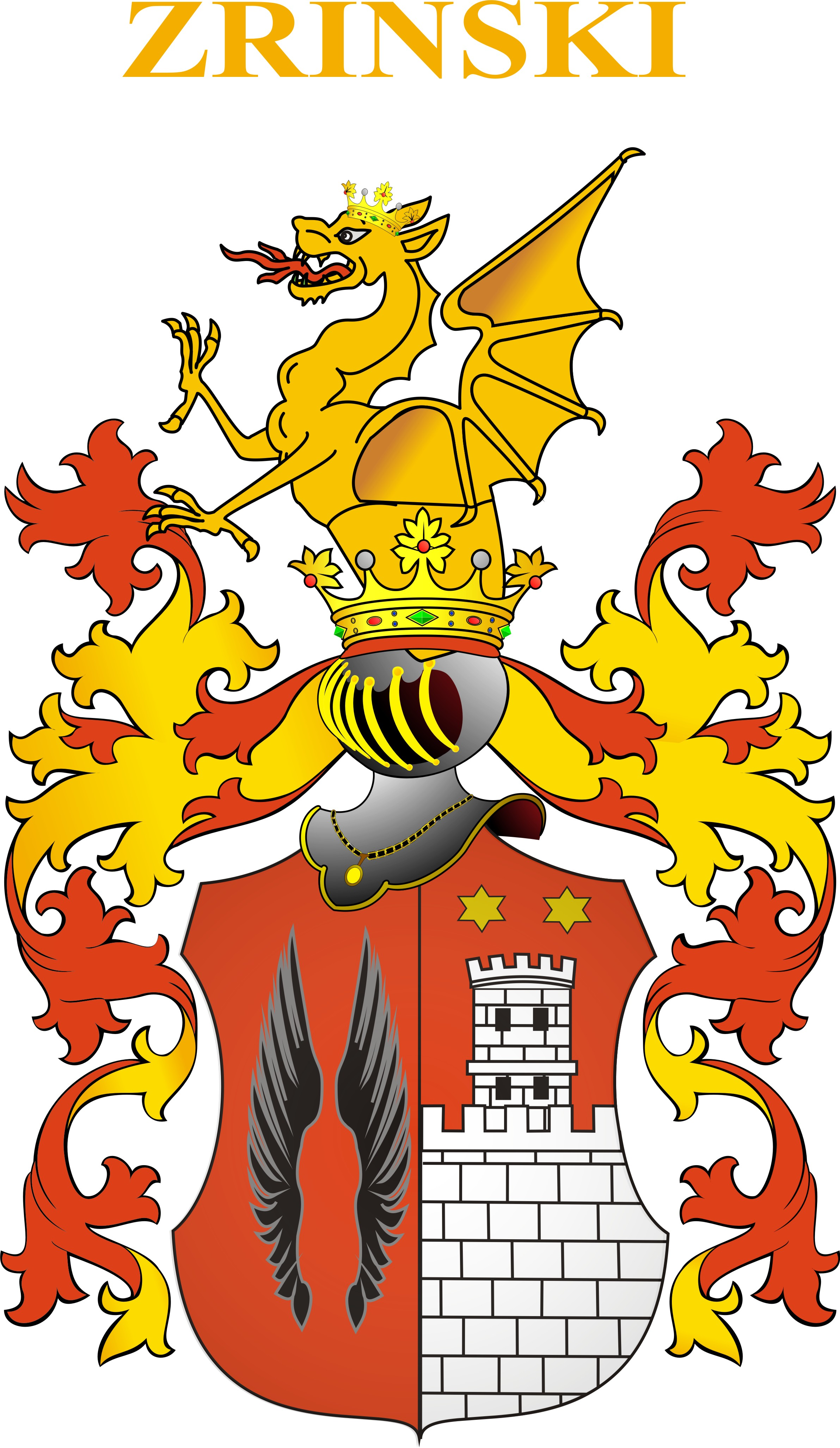 Grb obitelji Zrinski - prva inačica.